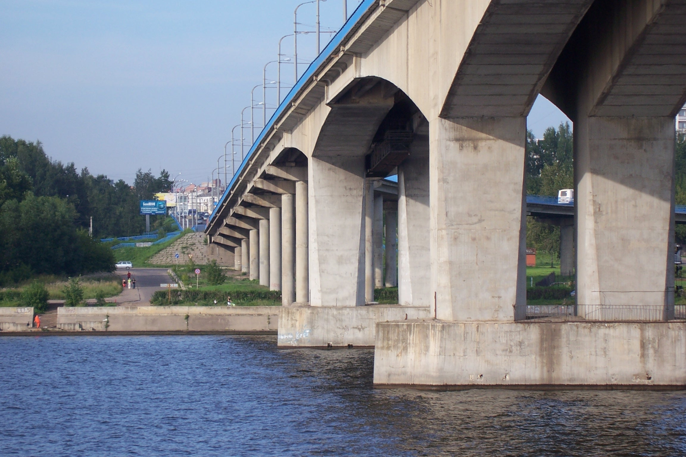 Костромской мост в 2008